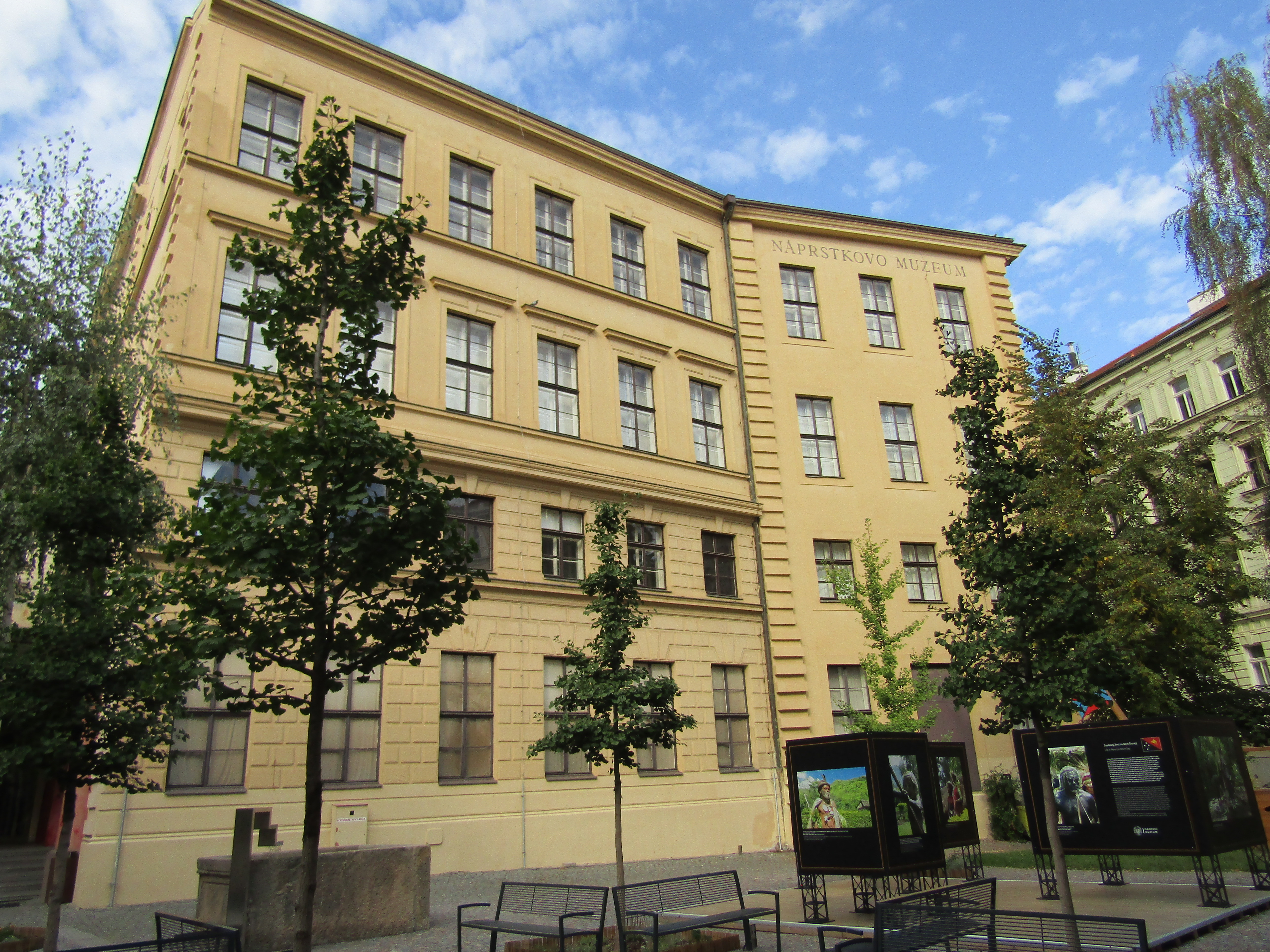 Náprstkovo muzeum asijských, afrických a amerických kultur, Praha